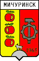 Герб Мичуринска (1965), Тамбовская область